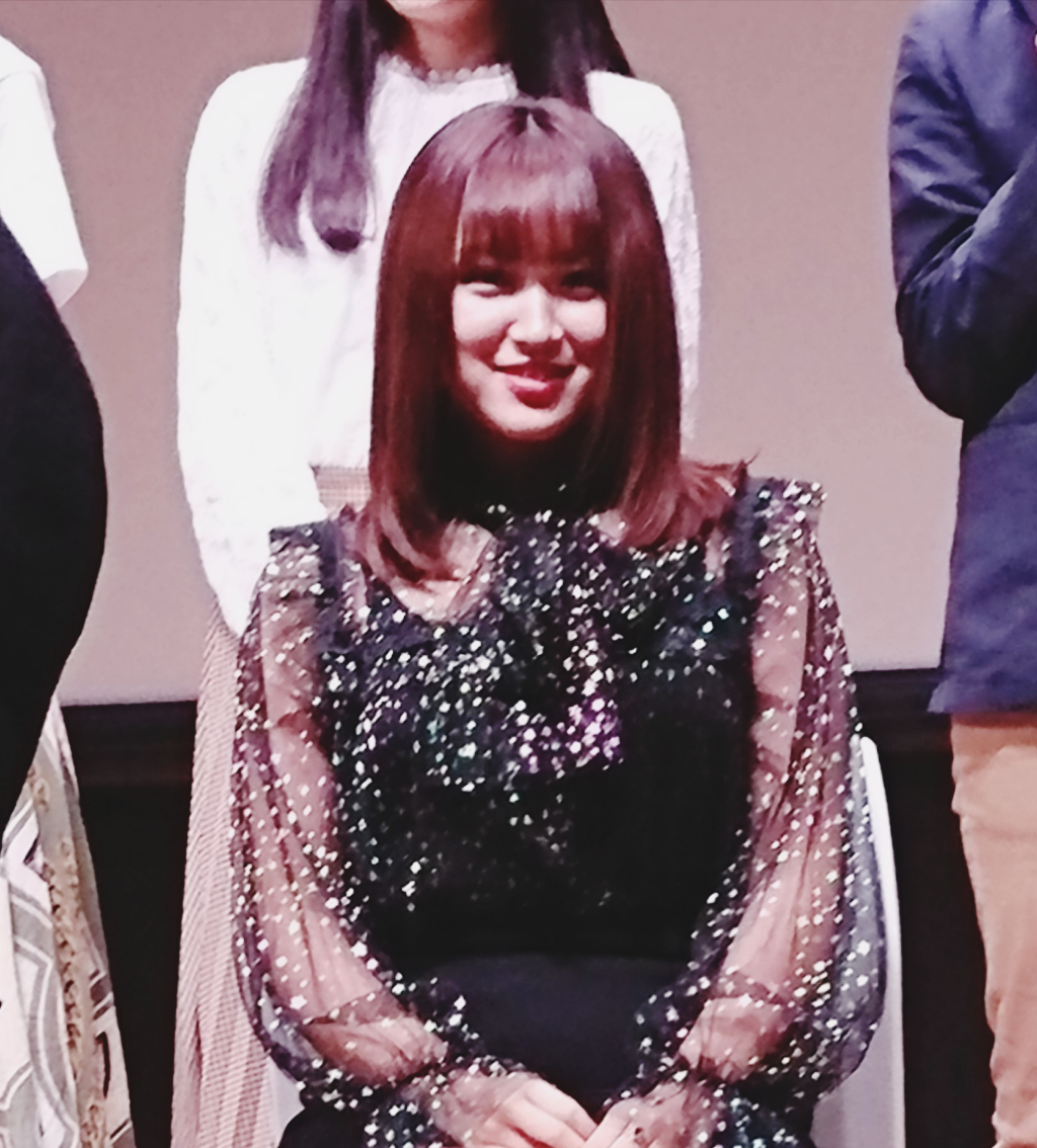 2019/10/06 渋谷シダックスカルチャーホール 第5弾‼️『きらめけ！VIVACIOUS ANGEL♡』にてkan kitaが撮影